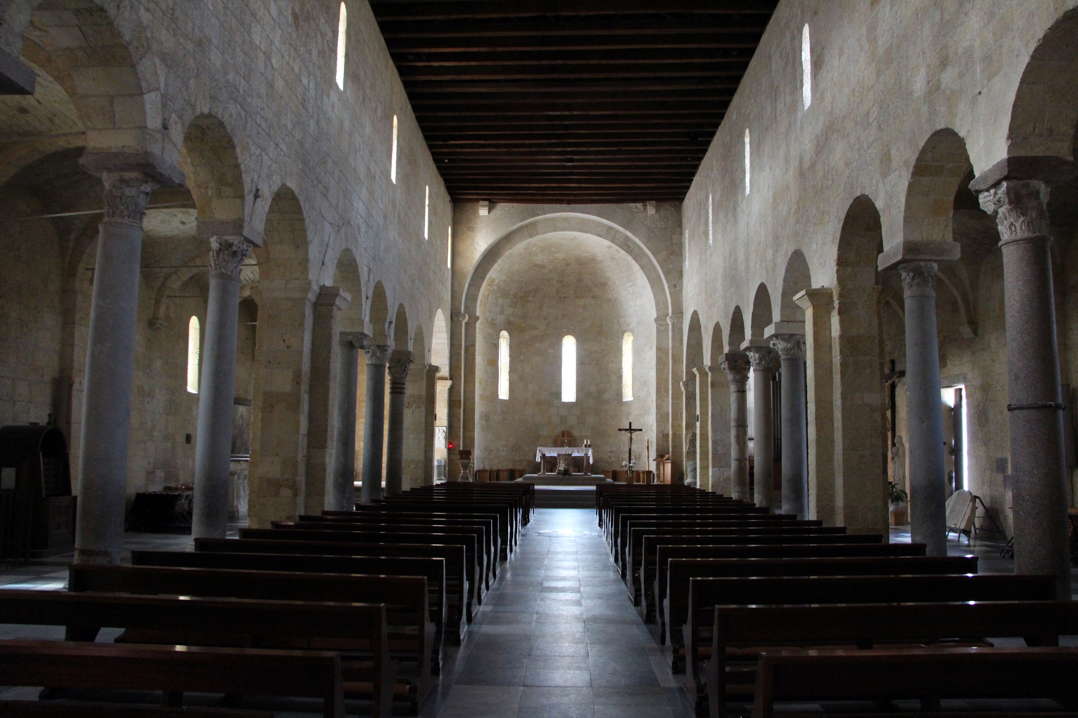 San Gavino (Porto Torres)